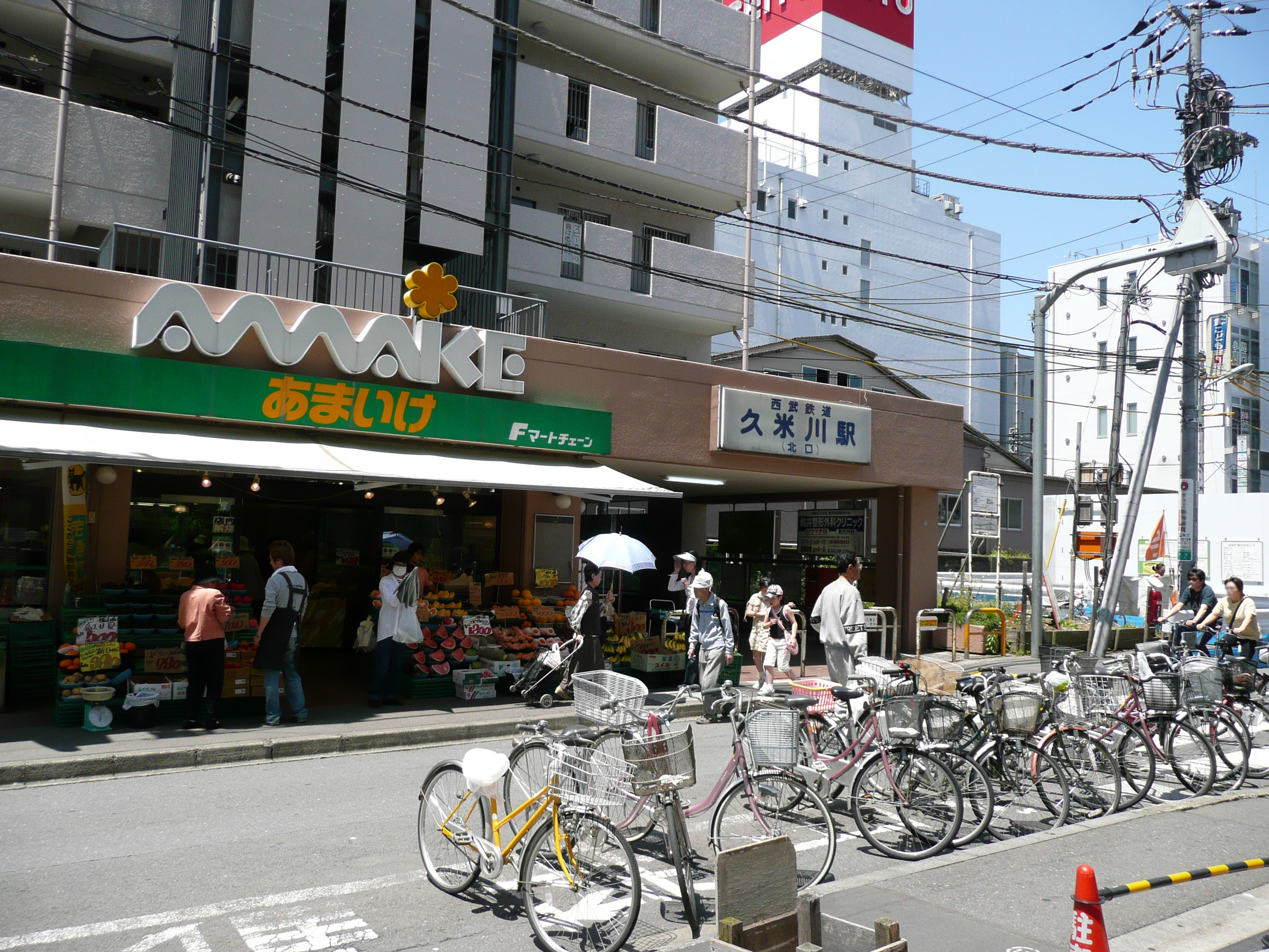 久米川駅北口